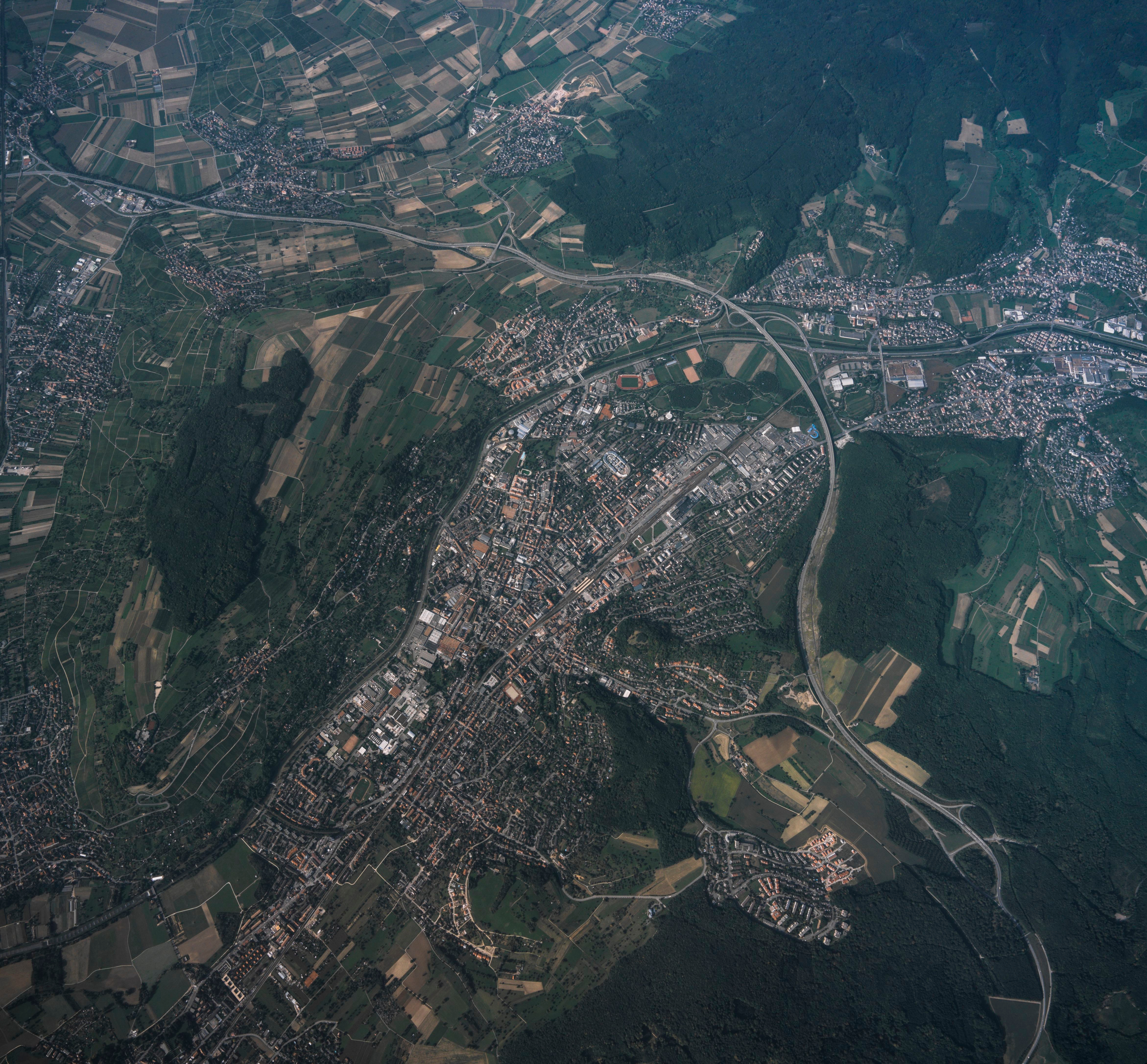 Vertikalbild von Lörrach, 1993